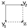 Definição da propriedade diamante. Linhas sólidas representam o quantificador univeral e linhas tracejadas representam o quantificador existencial.